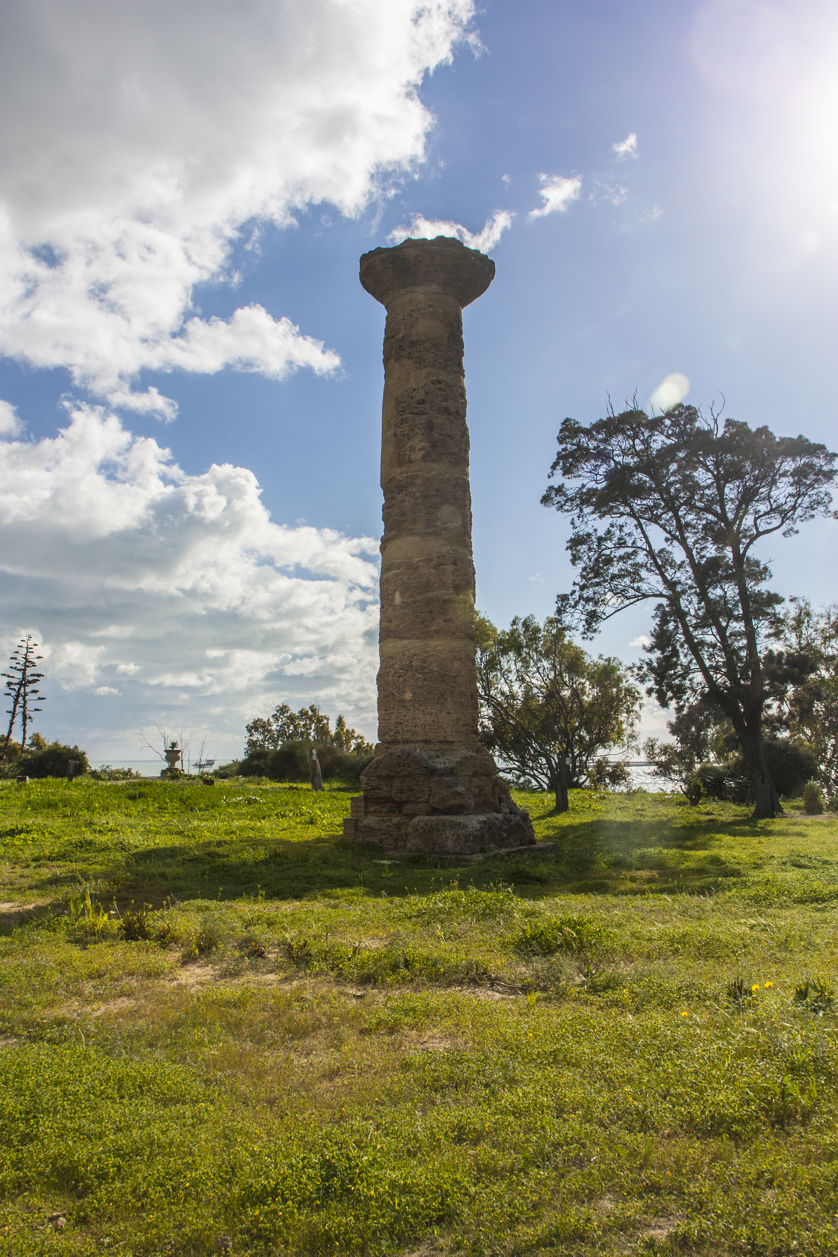 Acropoli di Gela